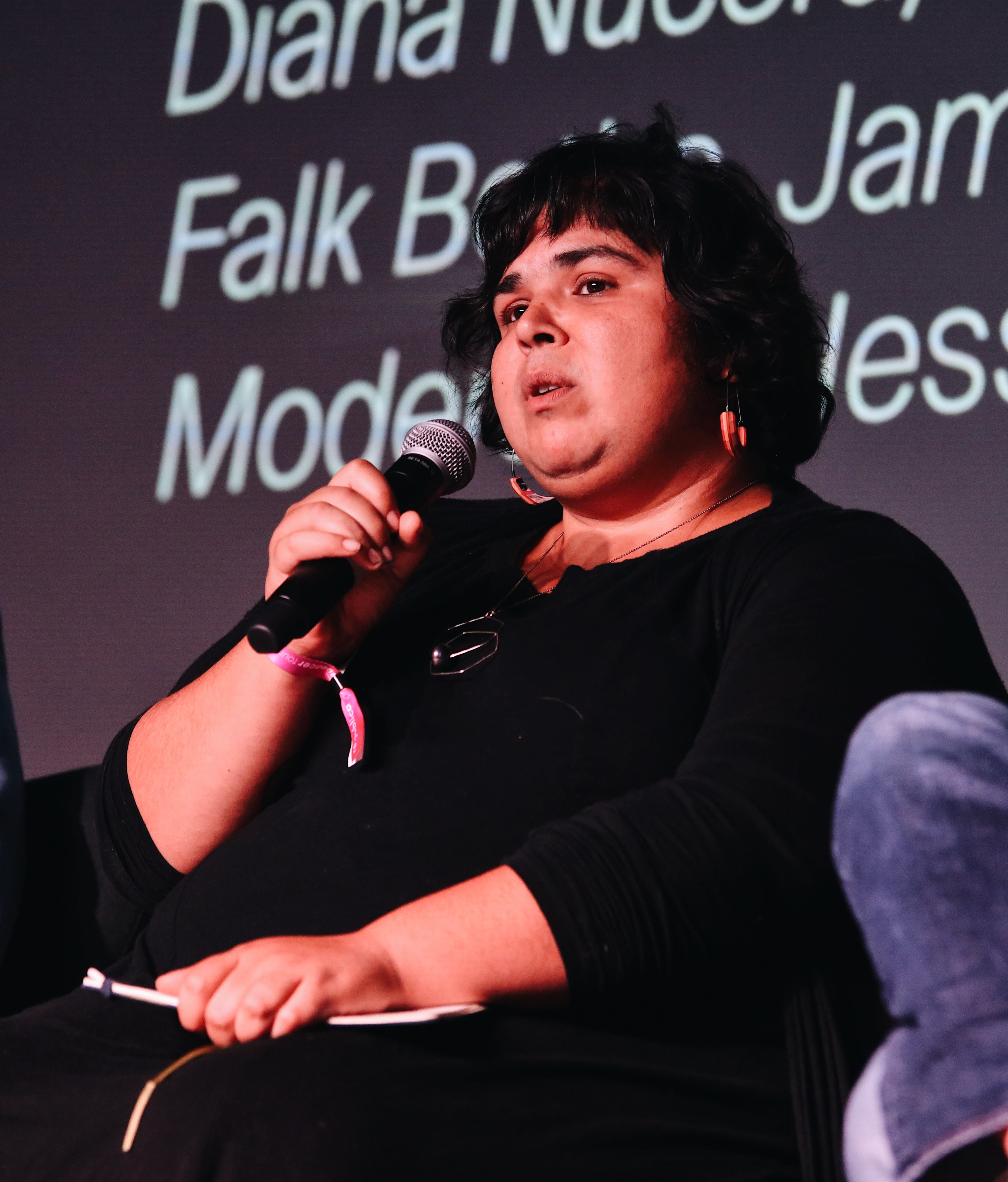 re:publica on Sequencer Tour